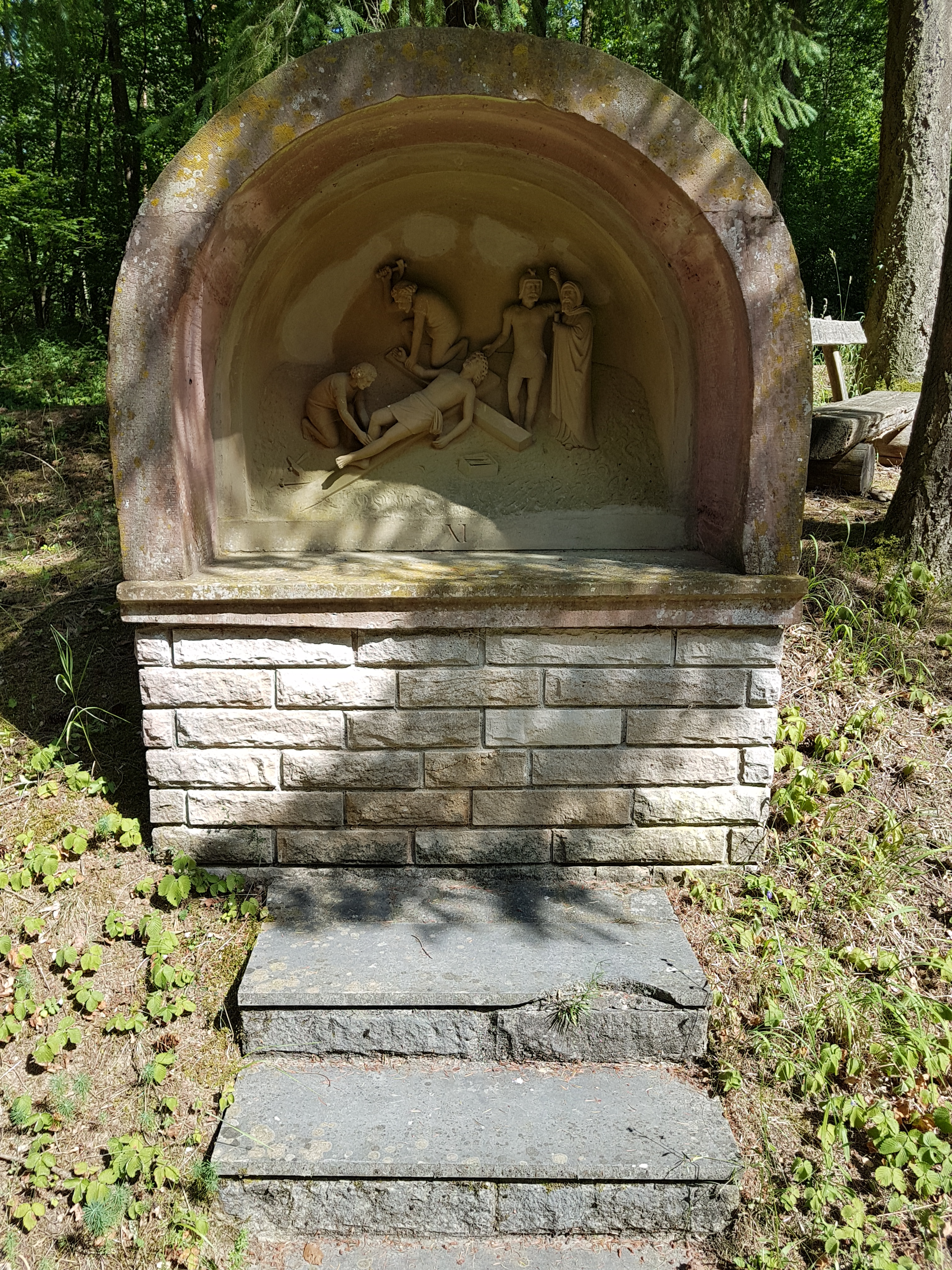 Kreuzweg zur Dittwarer Kreuzkapelle am Kreuzhölzle Bilder hochkant